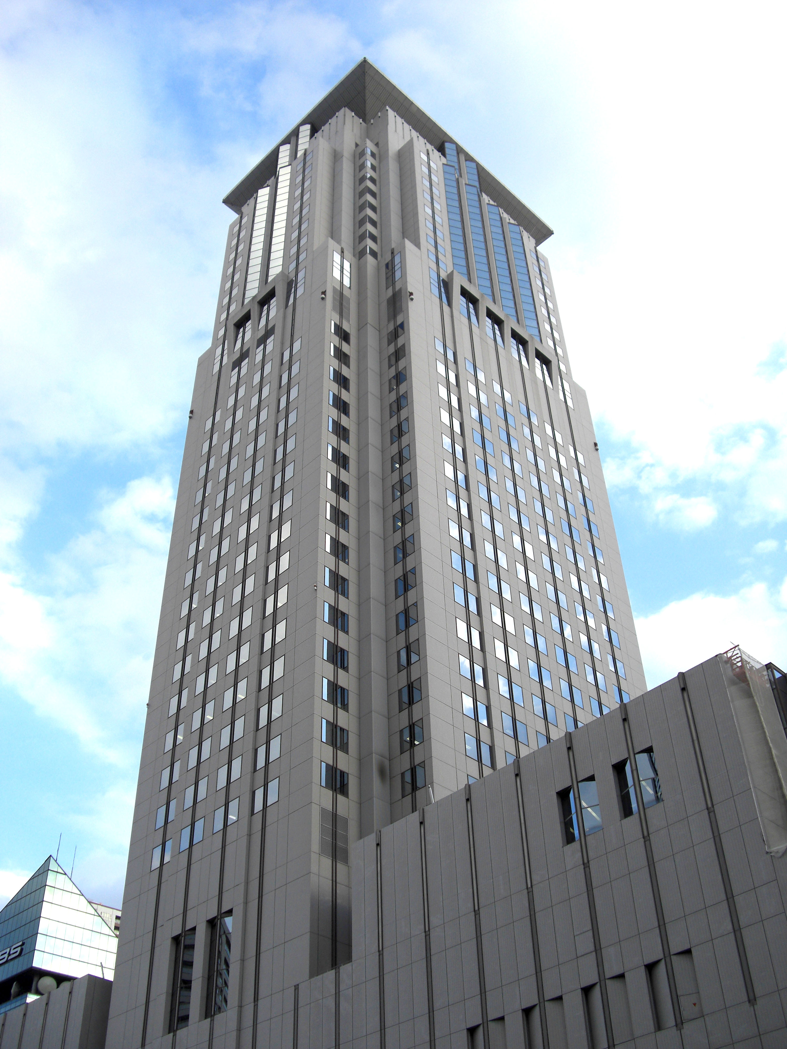 Hotel Hankyu International, Chayamachi, Kita-ku, Osaka-City, Osaka, Japan.